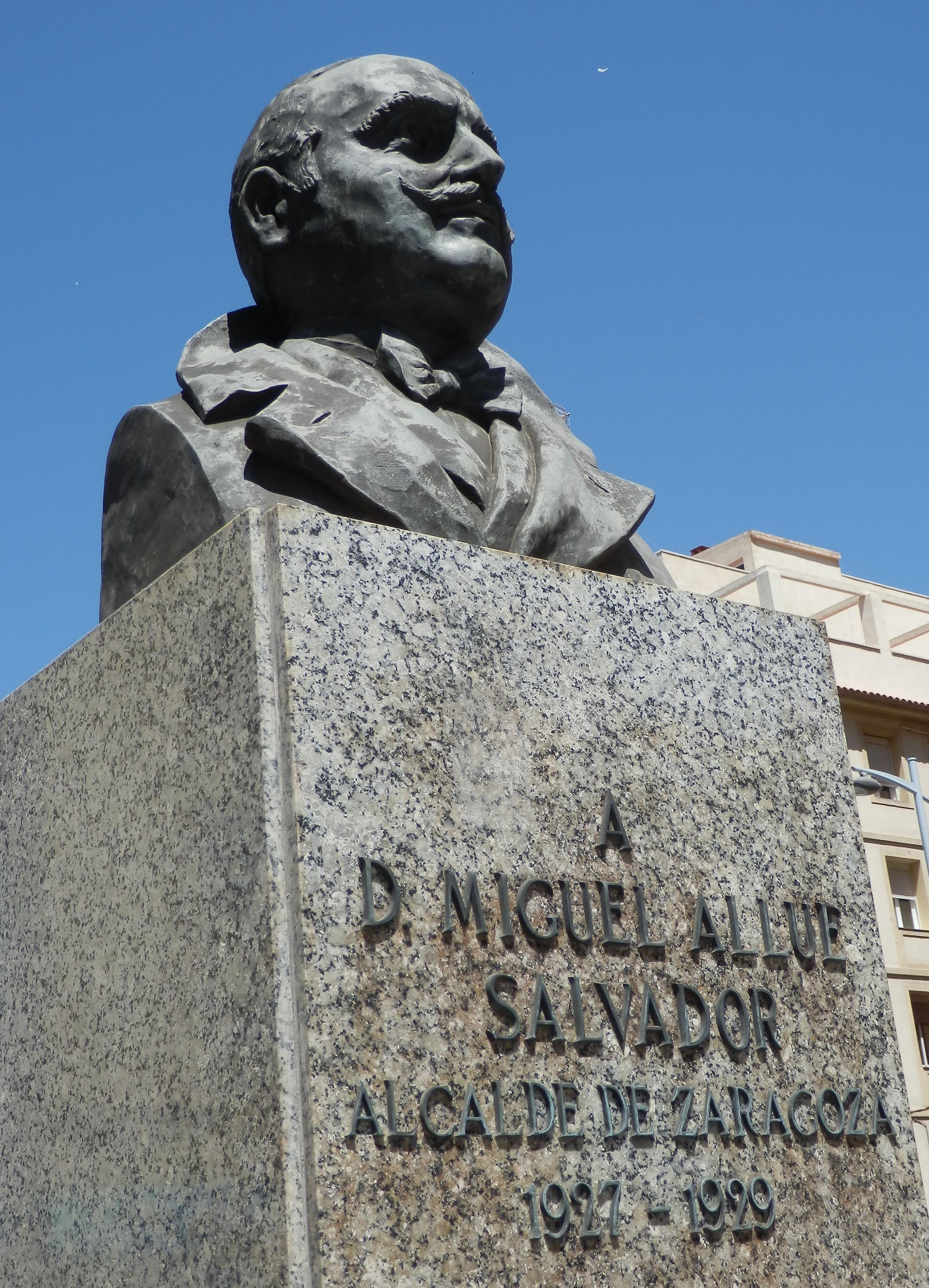 Estatua de Miguel Allué Salvador. Fue alcalde de Zaragoza entre 1927 y 1929.